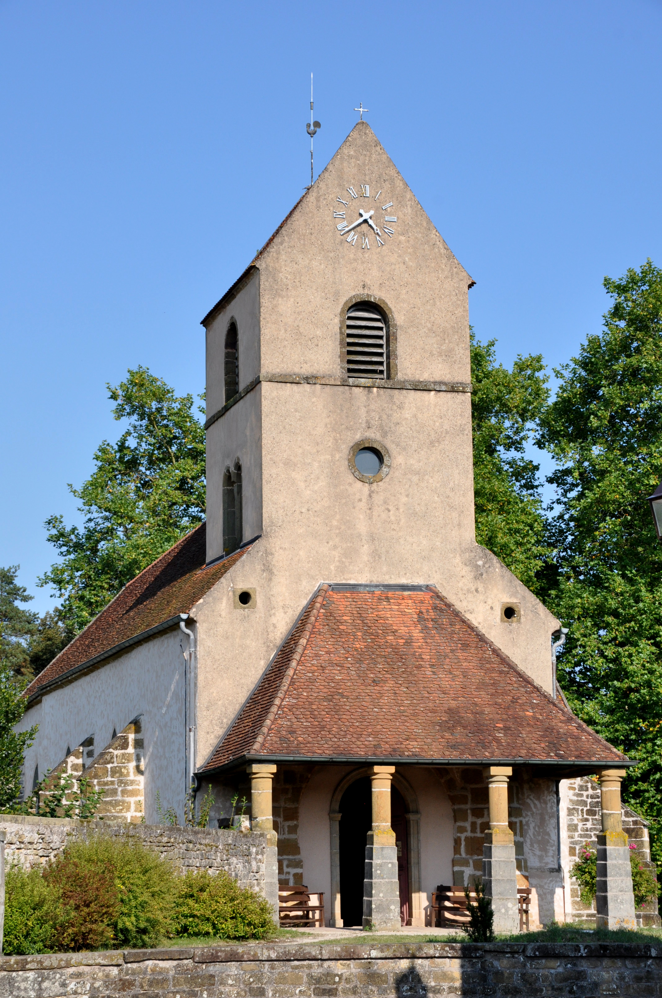 Bourguignon-lès-Conflans - église Saint-Georges .